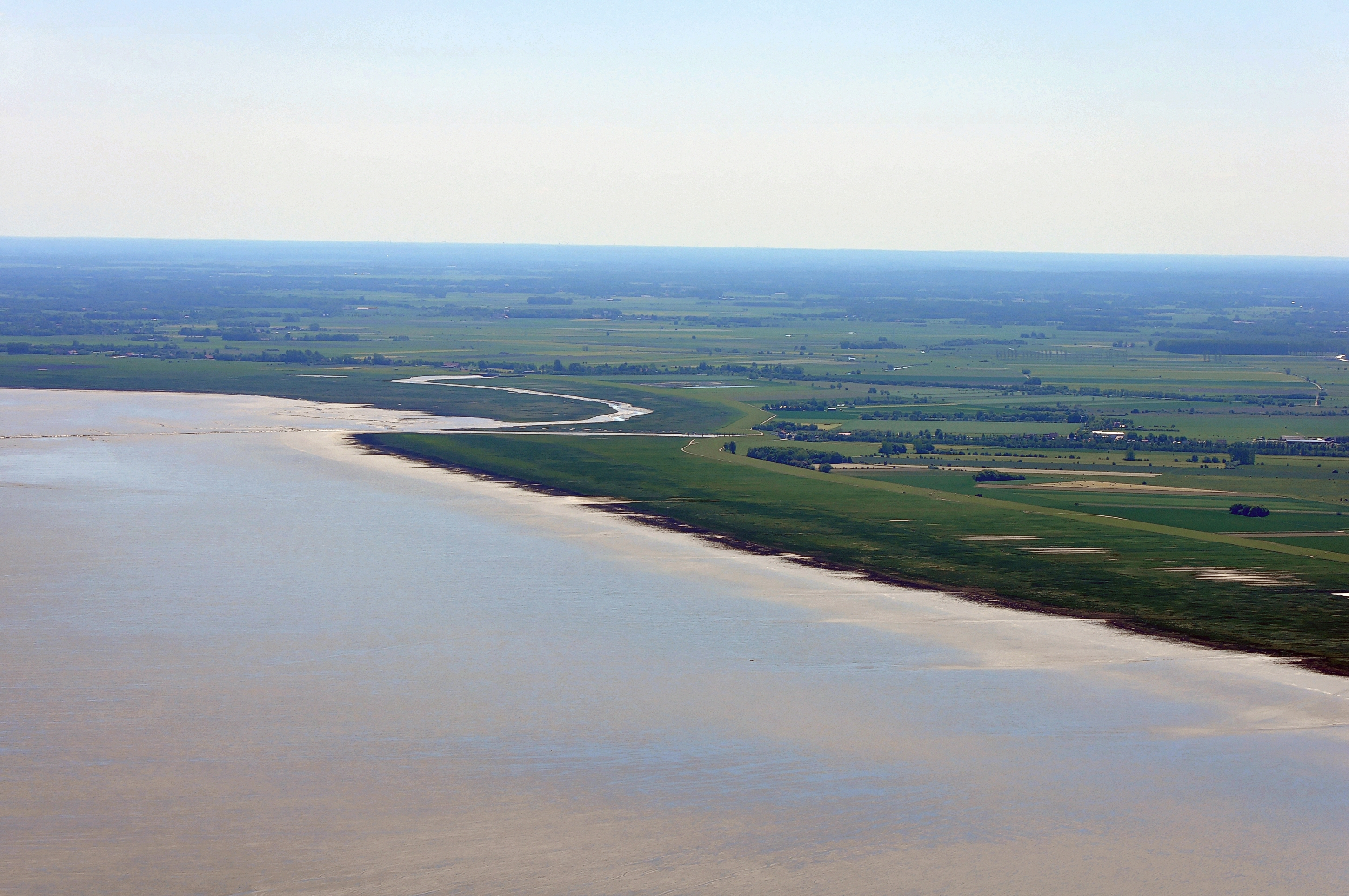 Luftbilder von der Nordseeküste 2012-05